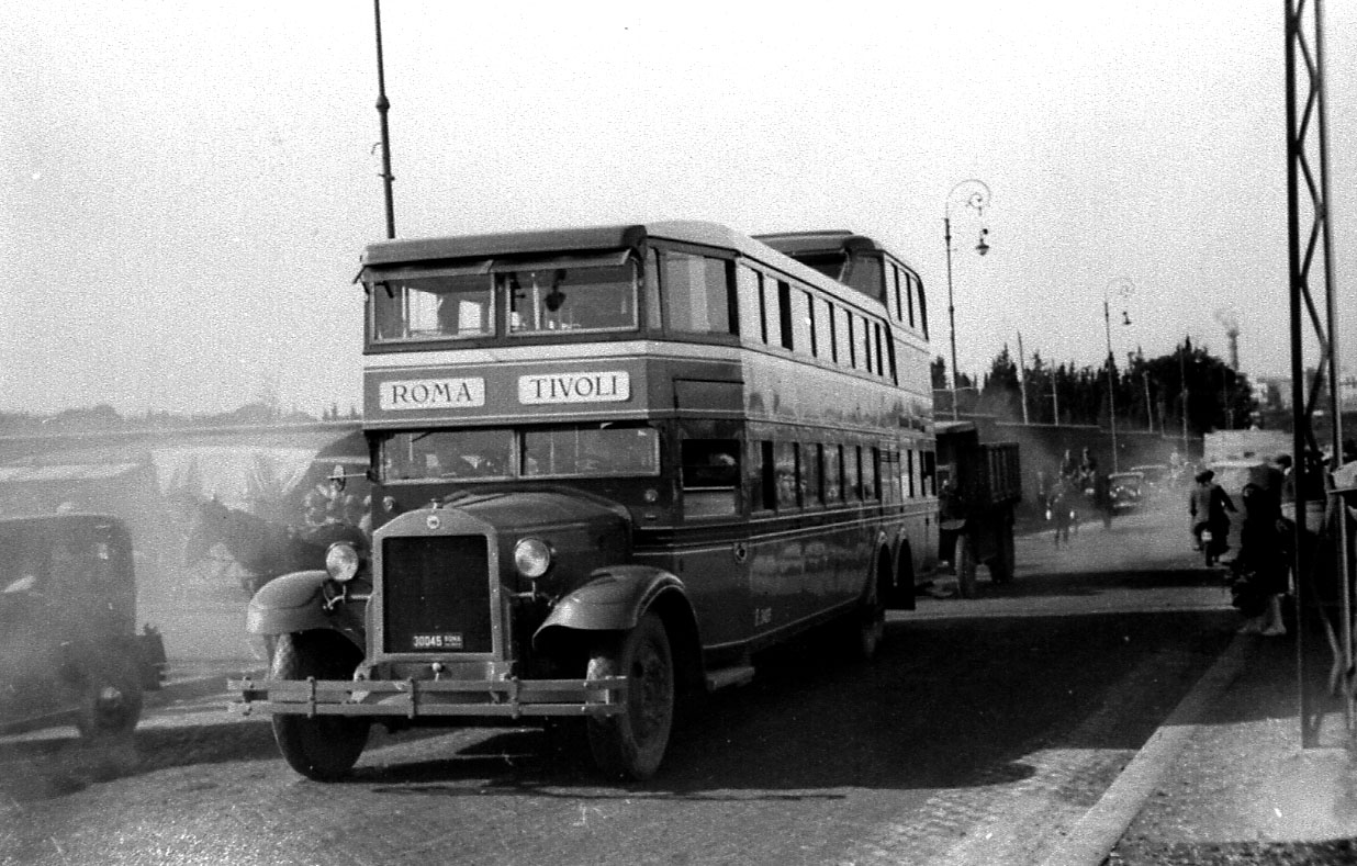 autoalveare